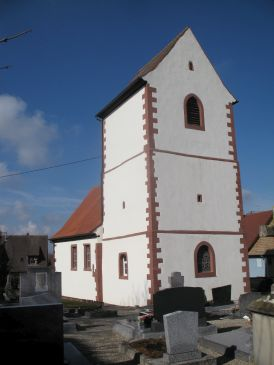 Église entourée du cimetière